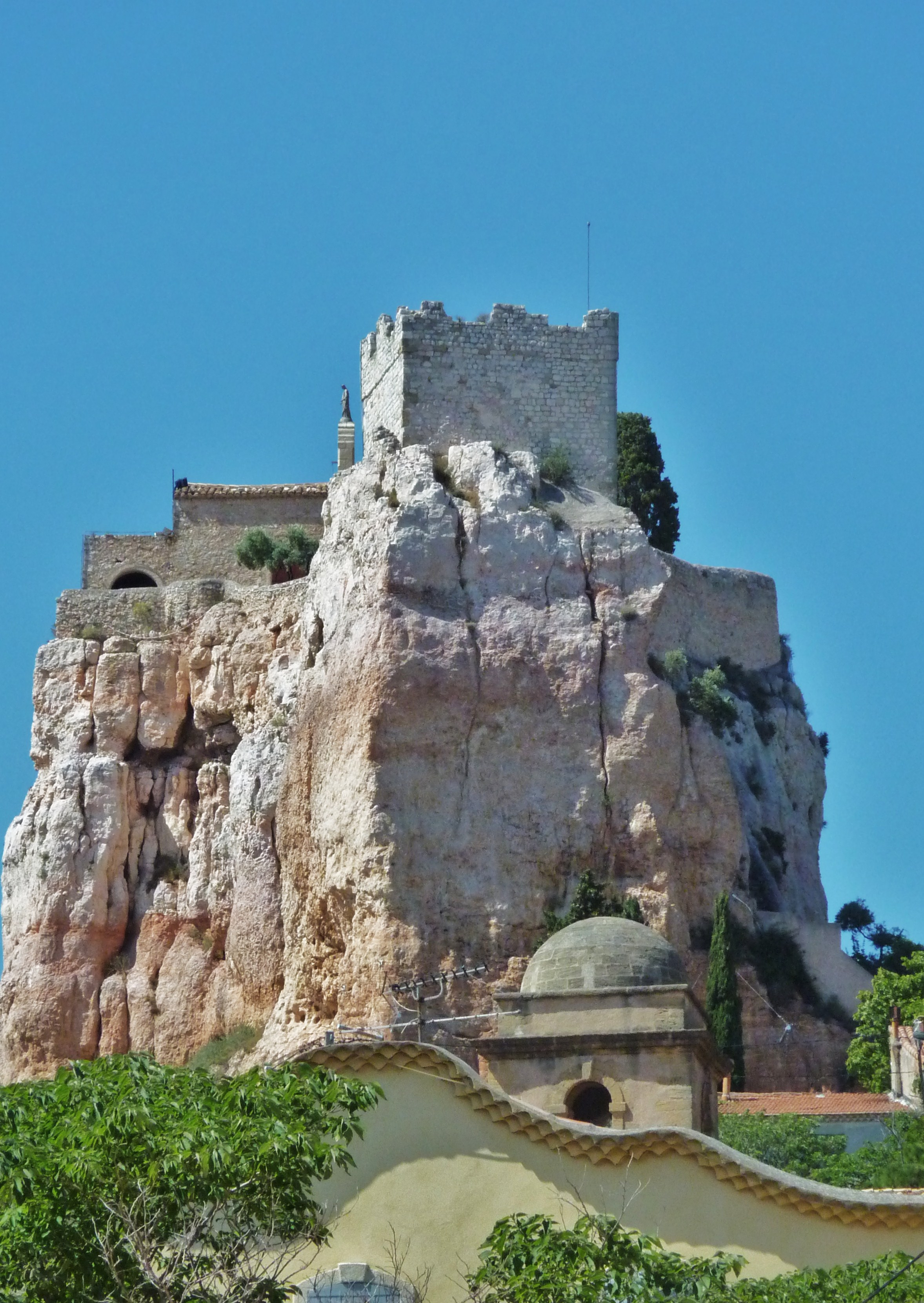 Vitrolles (Bouches-du-Rhône, France) : Tour sarrasine, (Inscrit, 1929) .